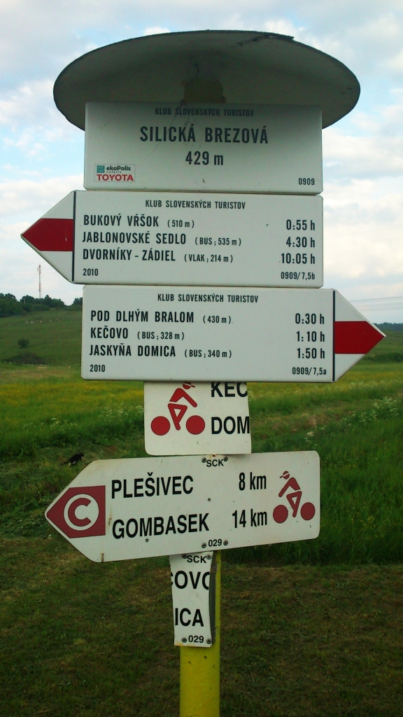 Turisticka tabula